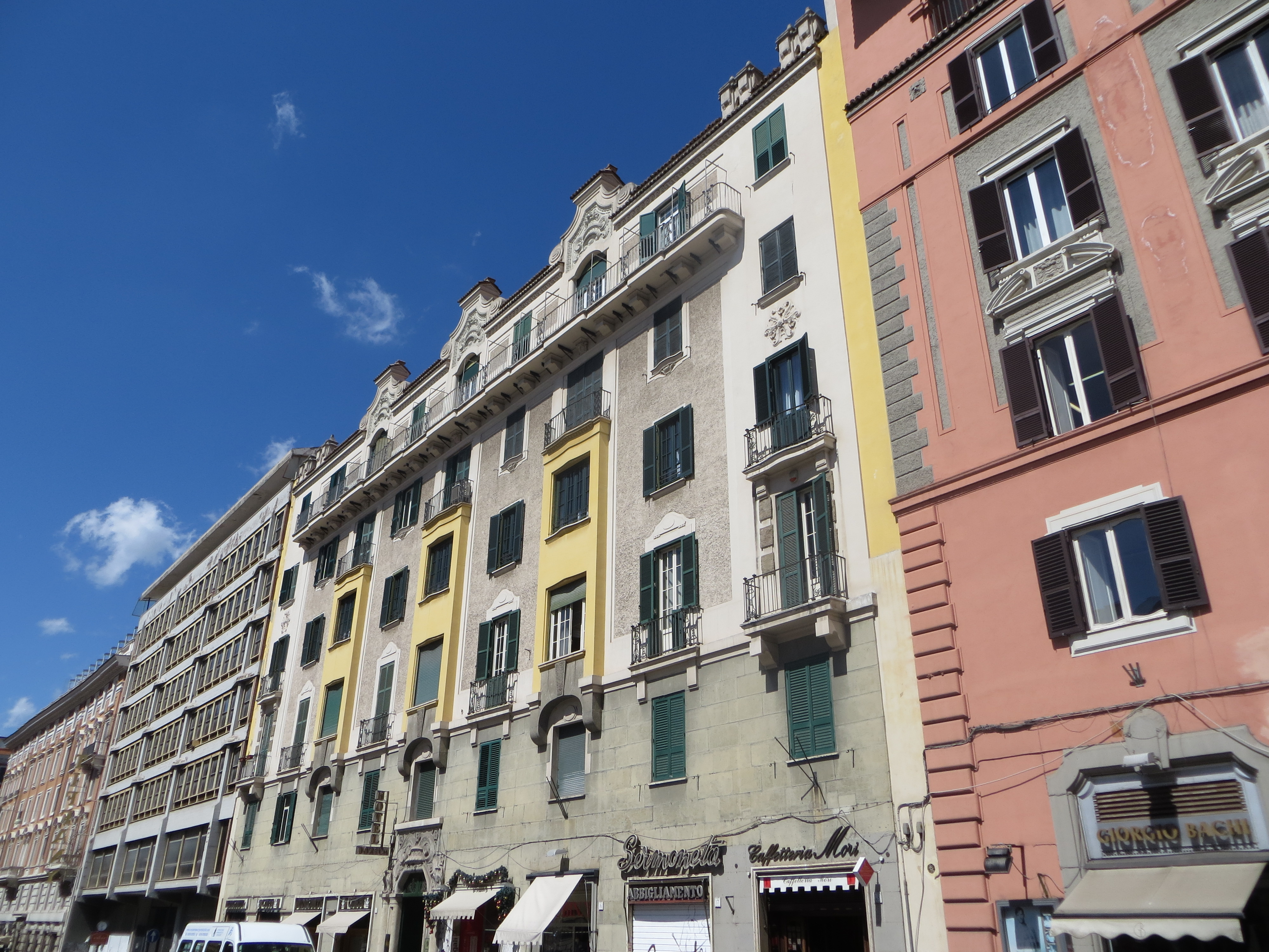 Rome